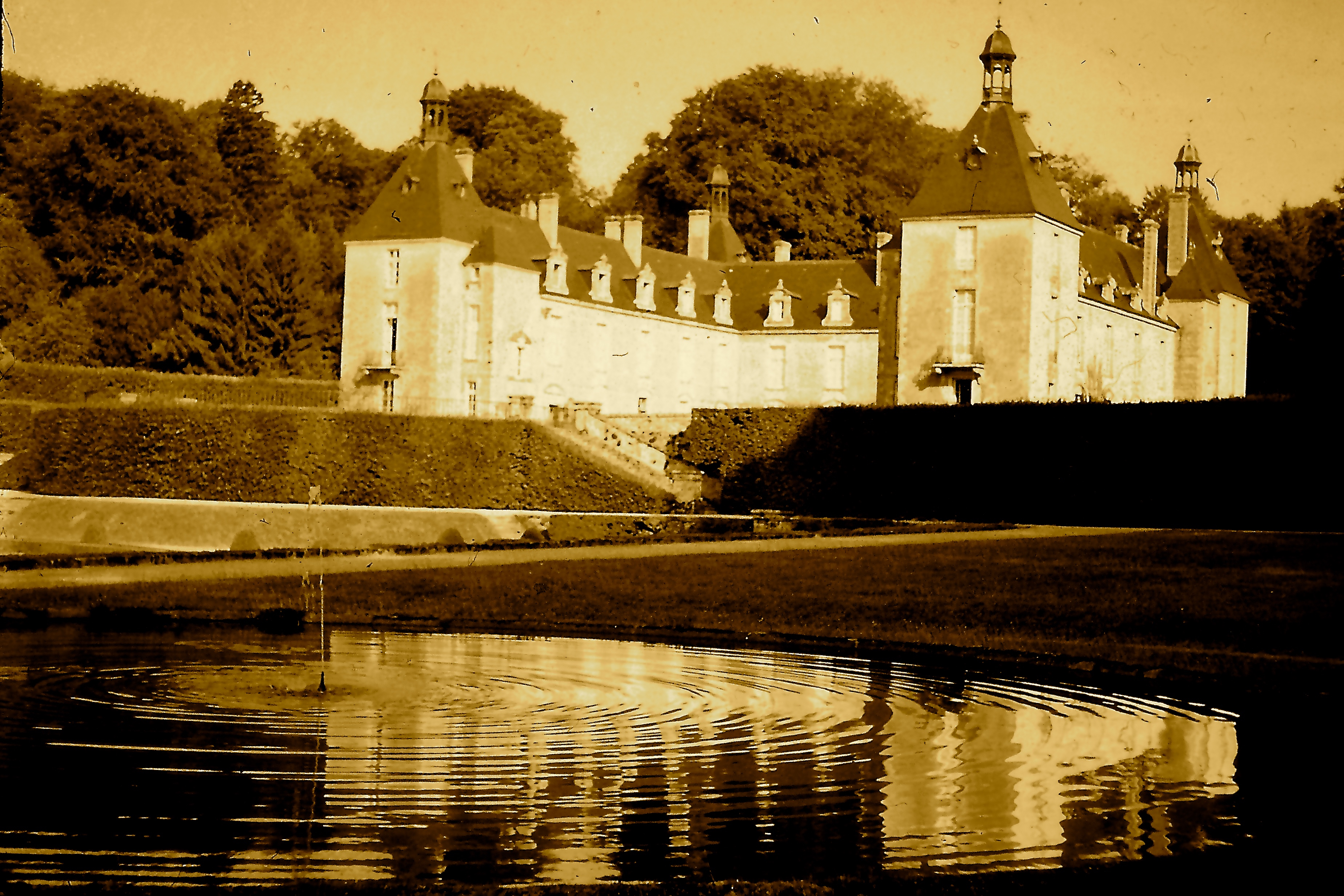 Chateau de Montjeu, Blick von Südost